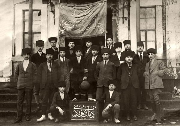 Balıkesir İdmanyurdu futbolcuları.